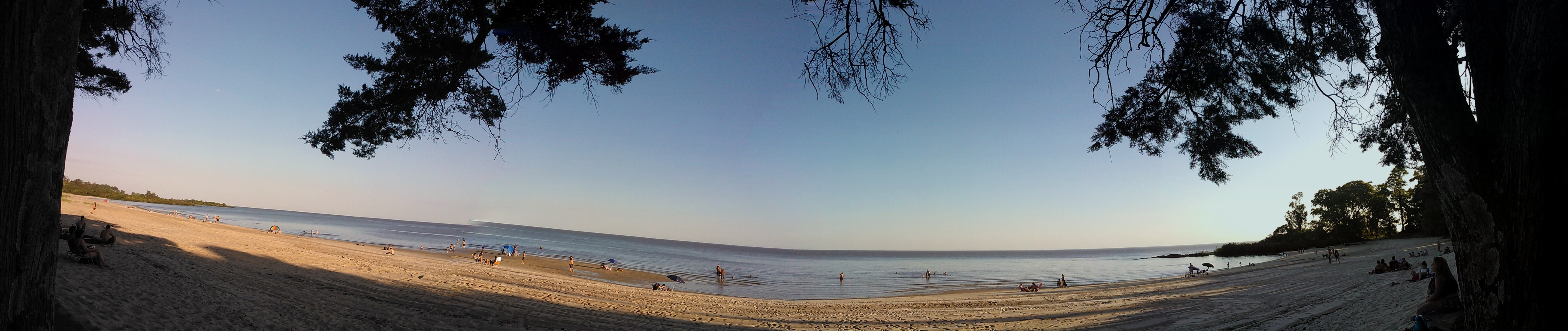 Foto panorámica de la Playa Fomento en Colonia del Sacramento.